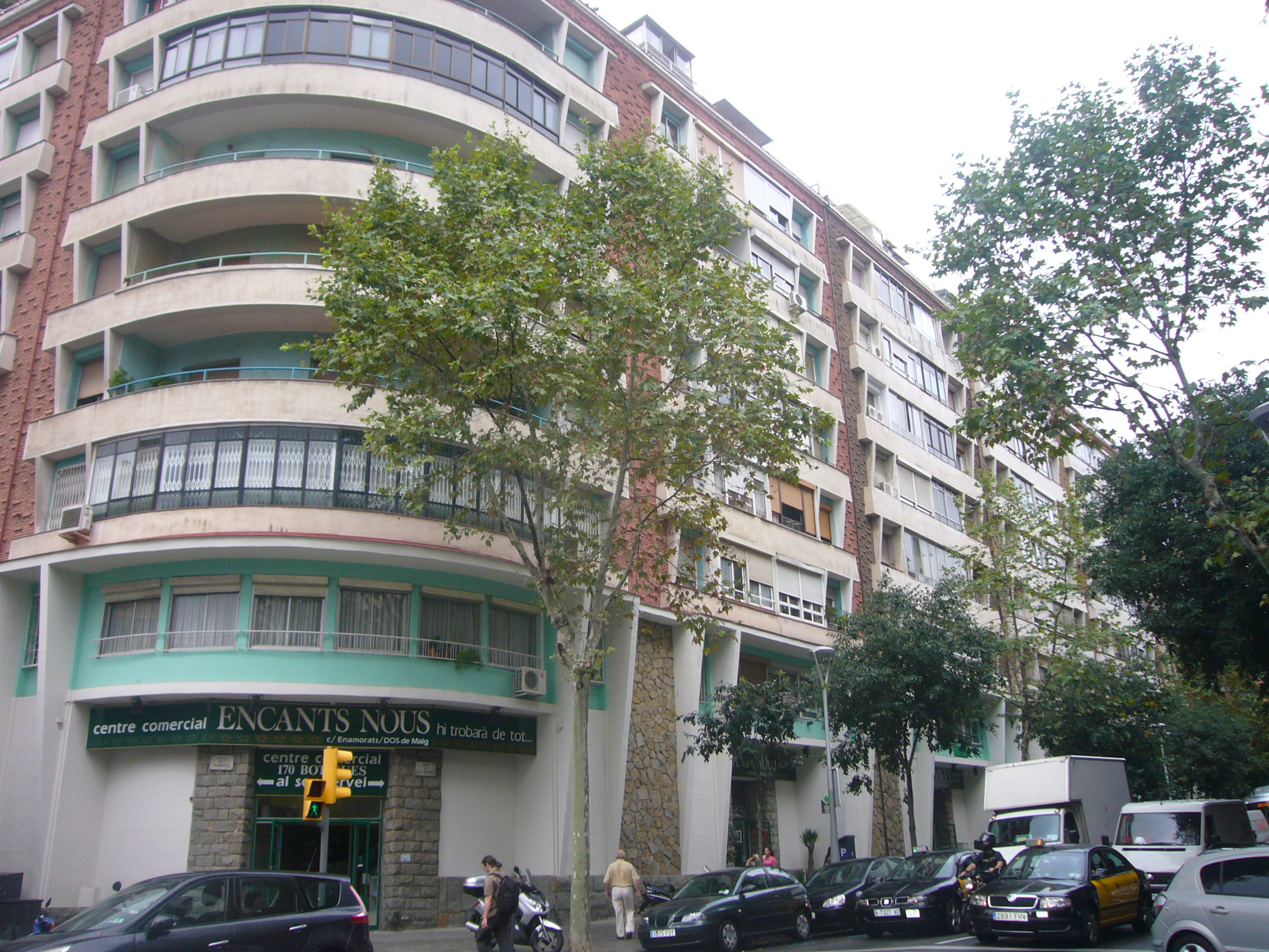 Edifici del centre comercial dels Encants Nous, al carrer Dos de Maig, a l'extrem del districte de l'Eixample